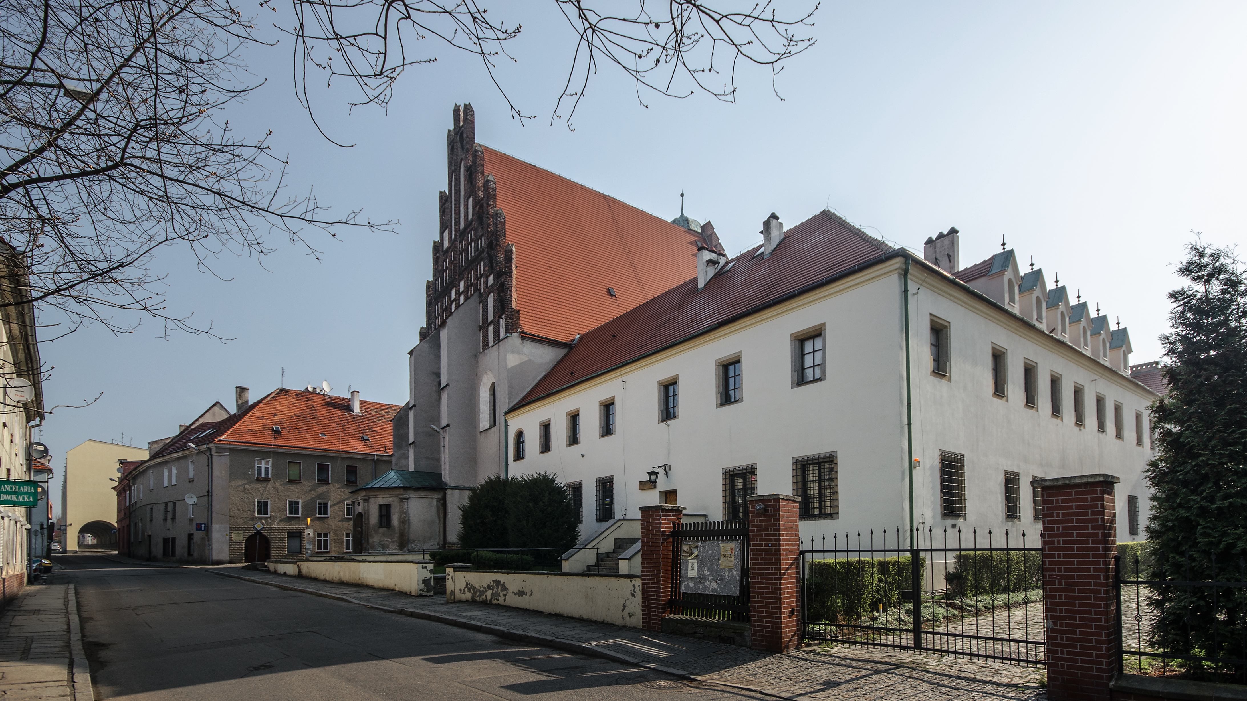 Jawor, zespół klasztorny franciszkanów, 1520, 1834